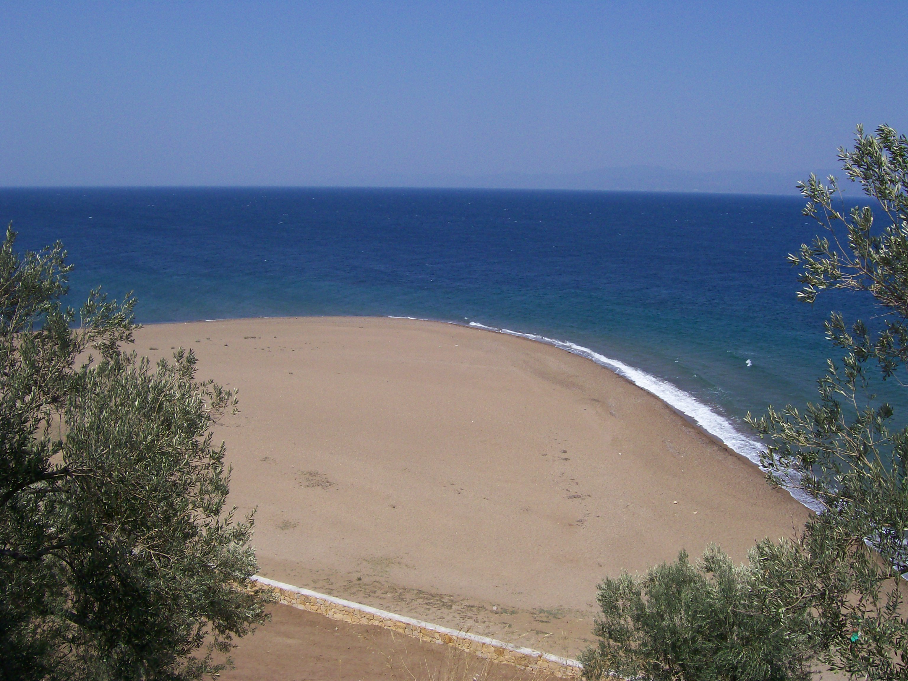 Bağlar Burnu veya Kum Burnu olarak adlandırılıan burun